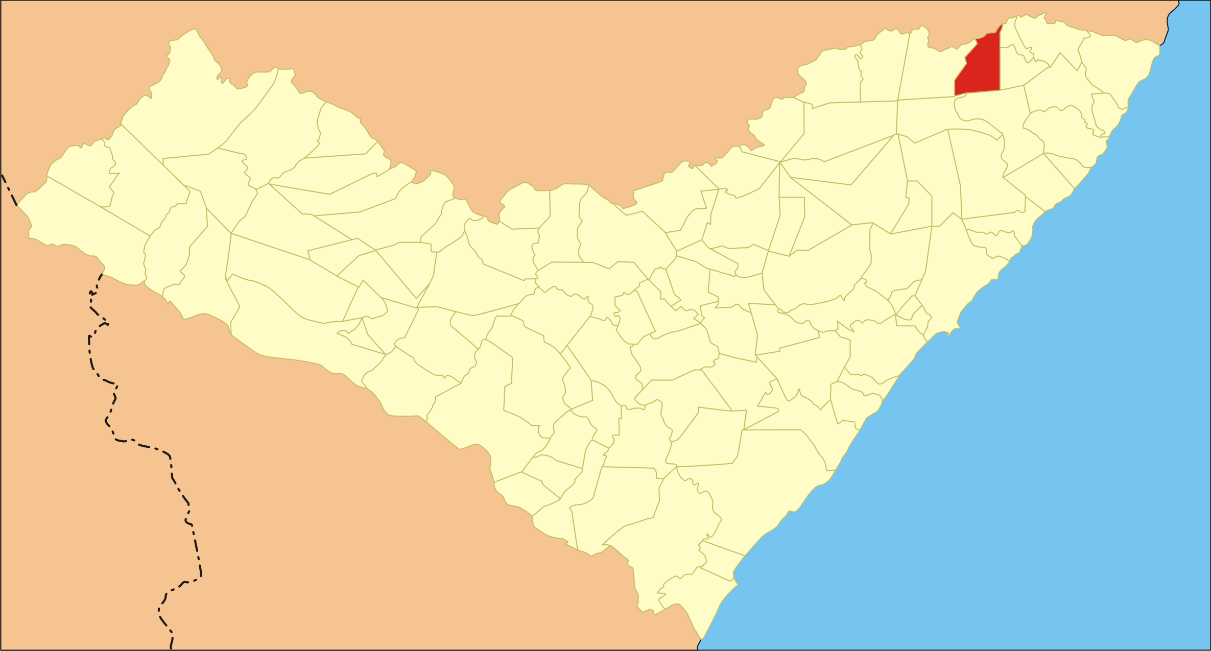 Localização da cidade no estado de Alagoas.